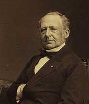 Jens Peter Trap (19.9.1810-21.1.1885), dansk kabinetssekretær og topografisk forfatter